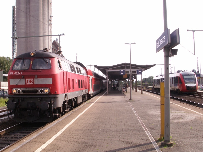 218 432-3 im Bahnhof Bad Oldesloe (rechts im Bild: Nordbahn nach Neumünster)